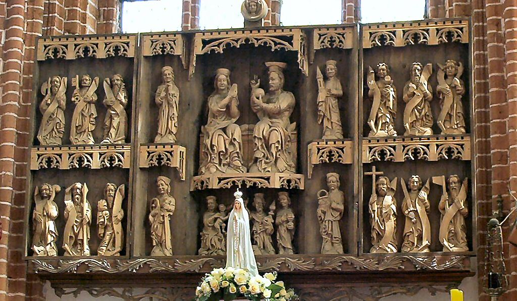 Kołbacz - ołtarz główny